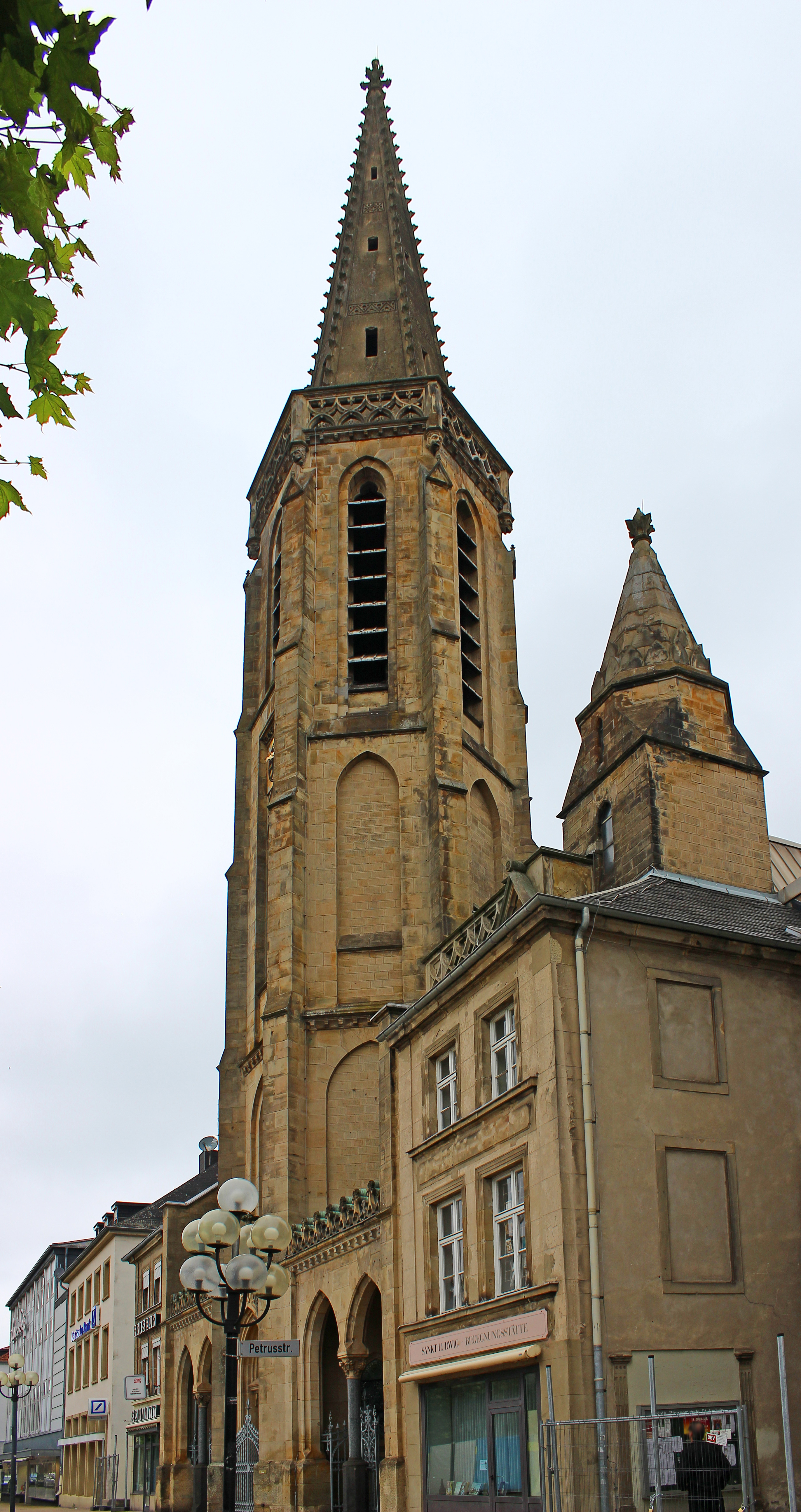 Die katholische Pfarrkirche St. Ludwig in Saarlouis, Saarland